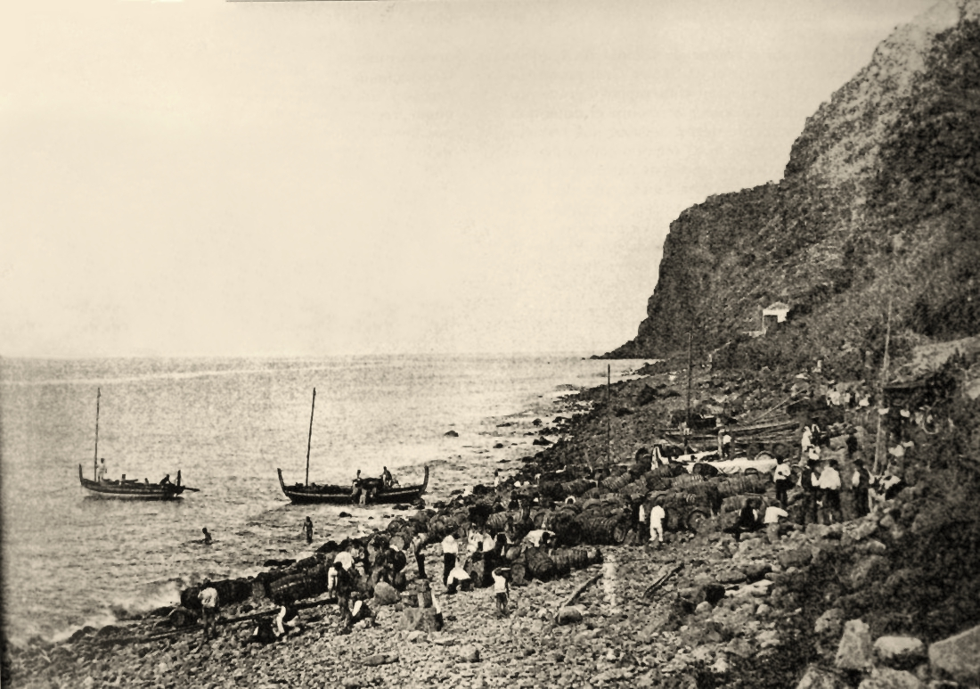 Barris de vinho preparados para serem transferidos para os barcos no Calhau da Calheta, uma forte vila na produção do Vinho da madeira no século XIX.